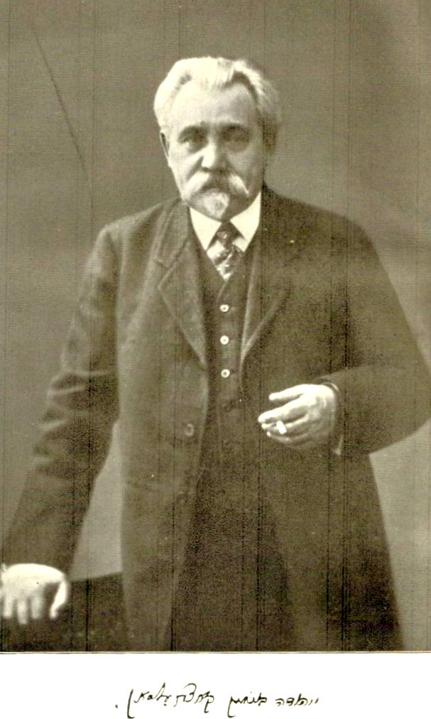 Buki Ben Yogli (Yehuda Leib Binyamin Katzenelson, 1846-1917)